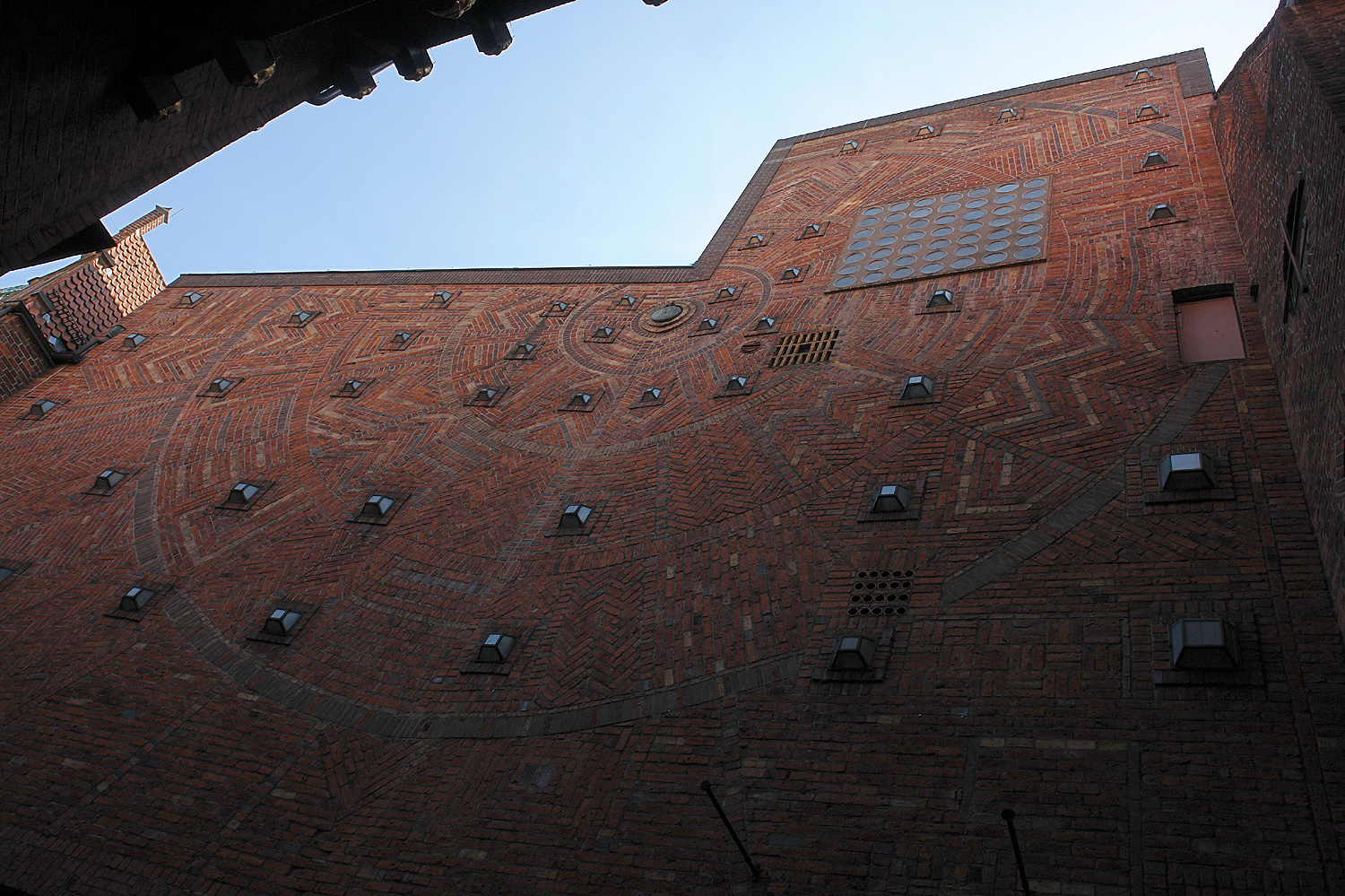 Böttcherstraße in Bremen. Fassade des Haus Atlantis, gestaltet von Ewald Mataré. Fertigstellung am 29.3.1965